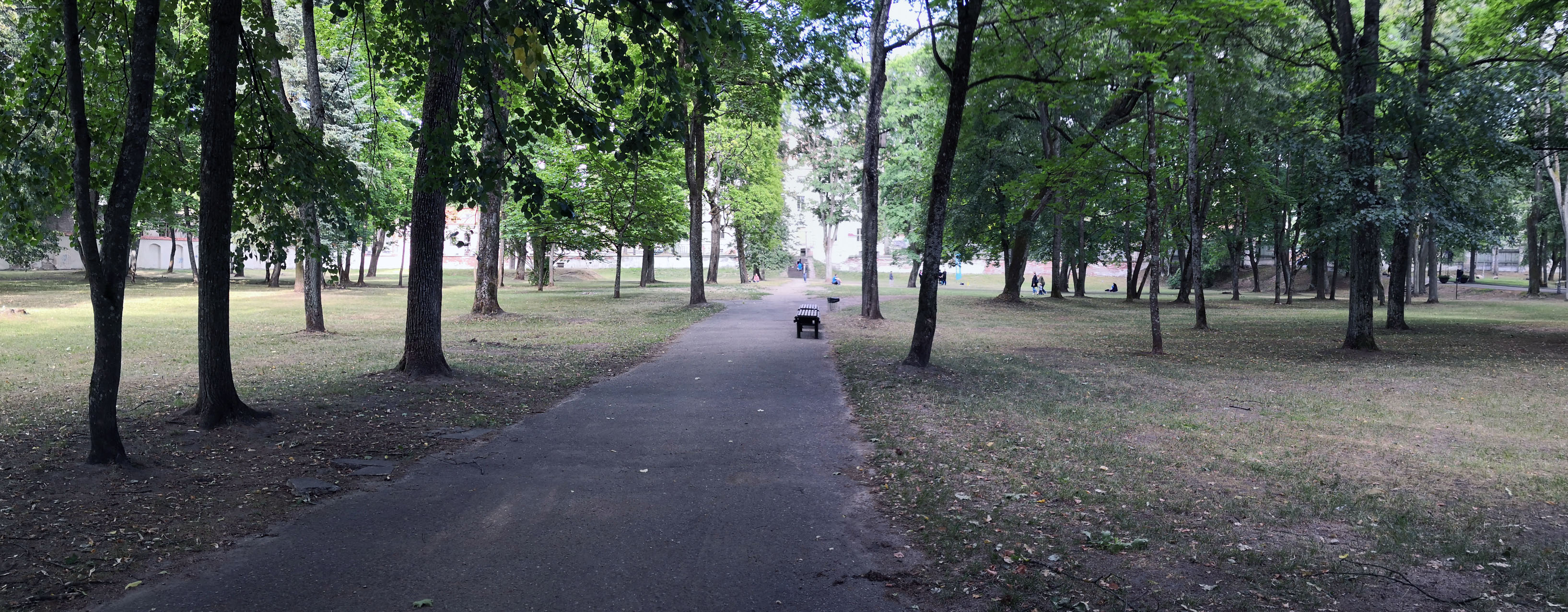 Bendras Sapiegų parko vaizdas, 2018 m. vasara. G. Kulikausko fotografija.